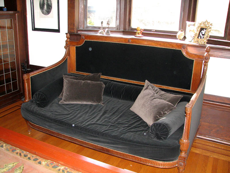 Une banquette de style Louis XVI fabriquée au 19ème siècle.